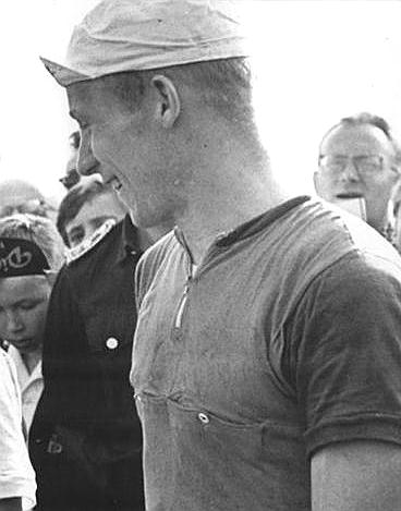 Axel Peschel, 1966